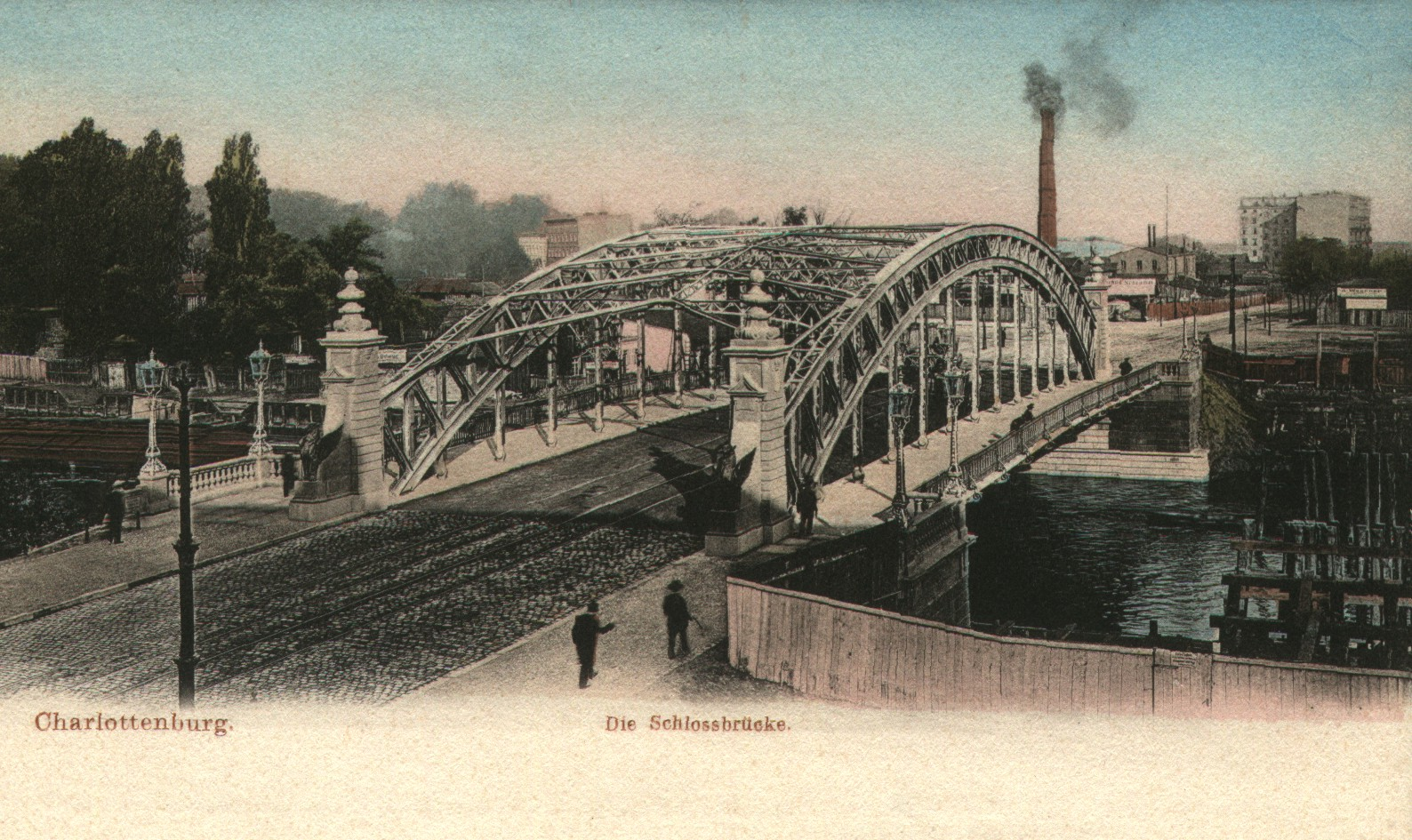 alte Schlossbrücke Charlottenburg